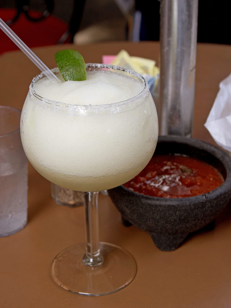 Blended margarita